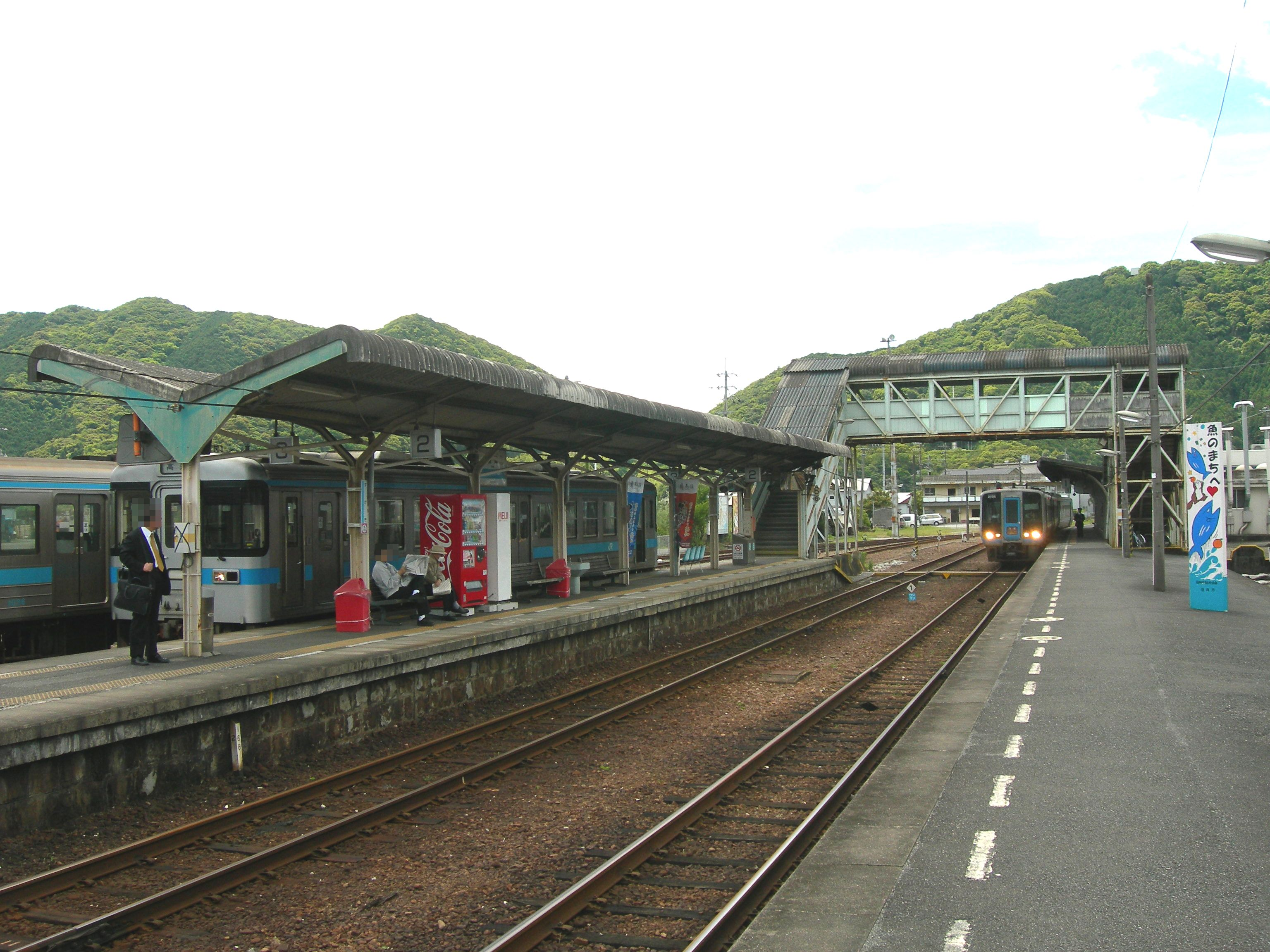 須崎駅 ホーム